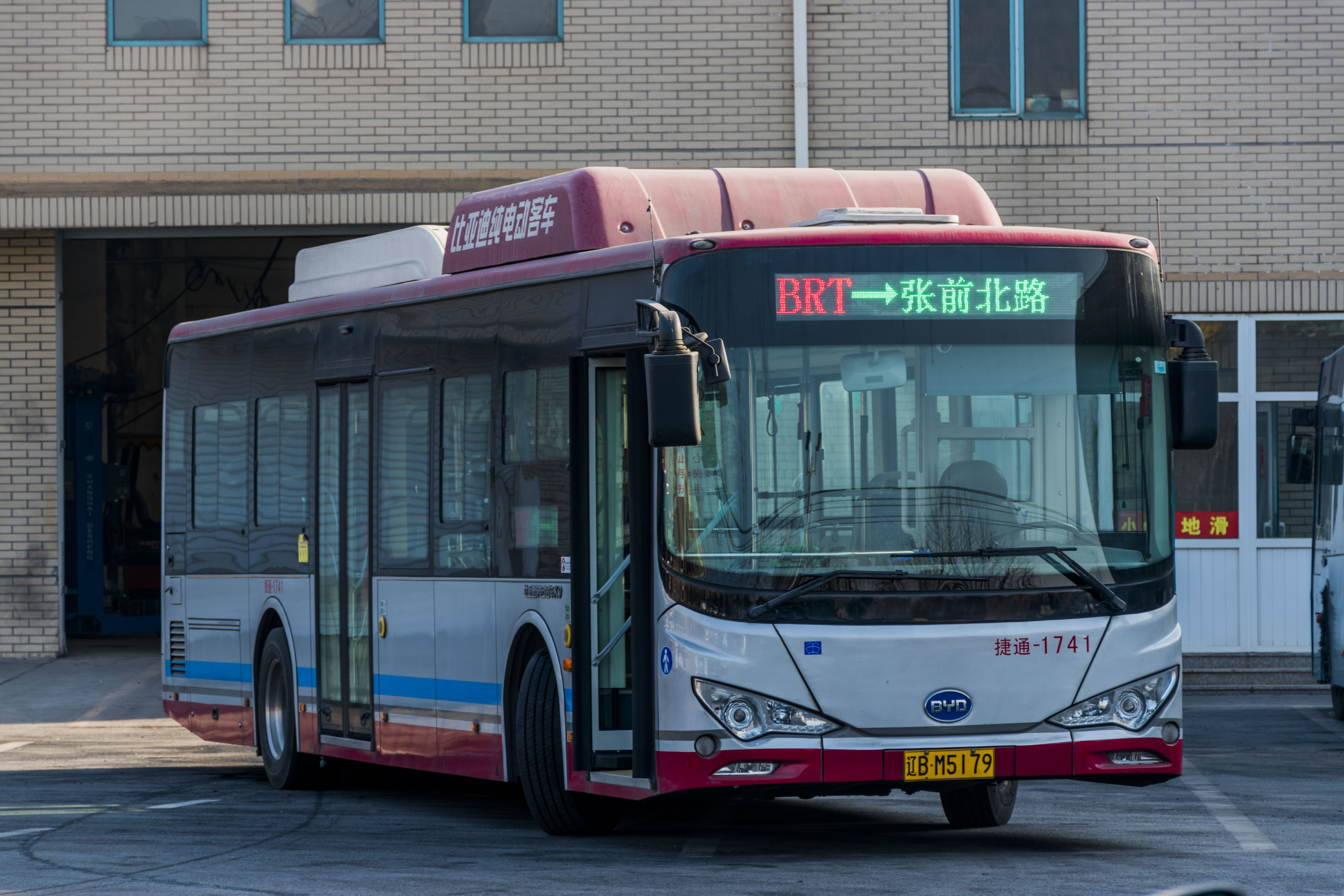 大连快速公交目前正在使用的比亚迪K9F客车